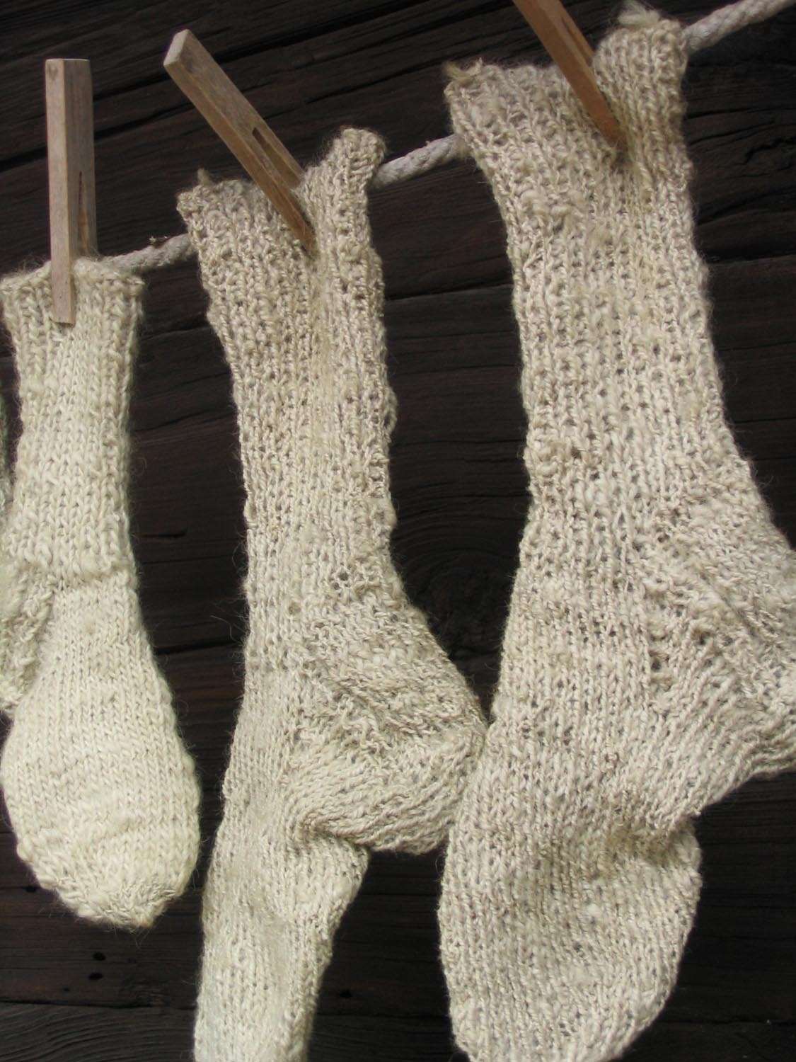 drei Strümpfe auf der Leine